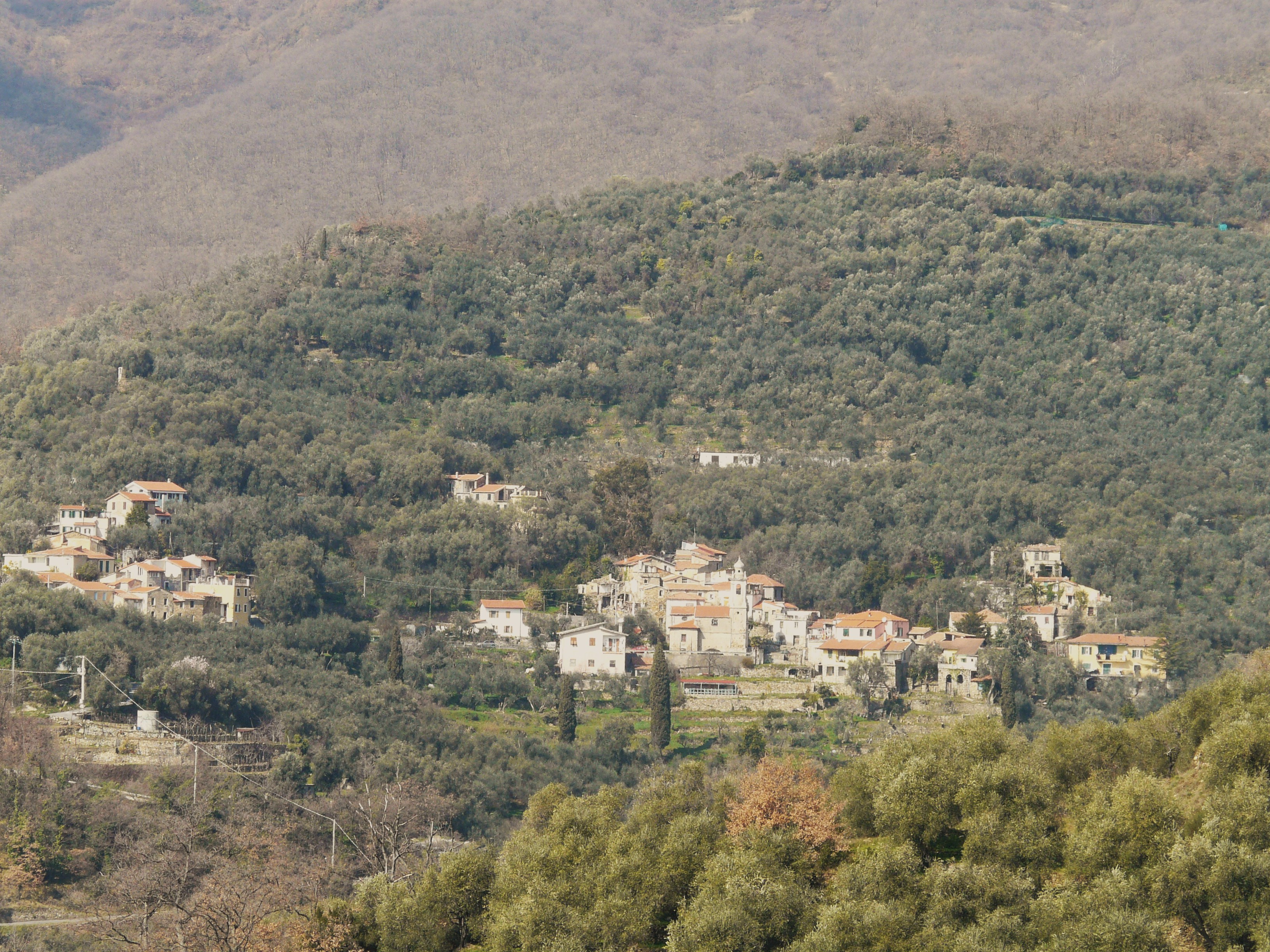 Pianavia, Vasia, Liguria, Italia